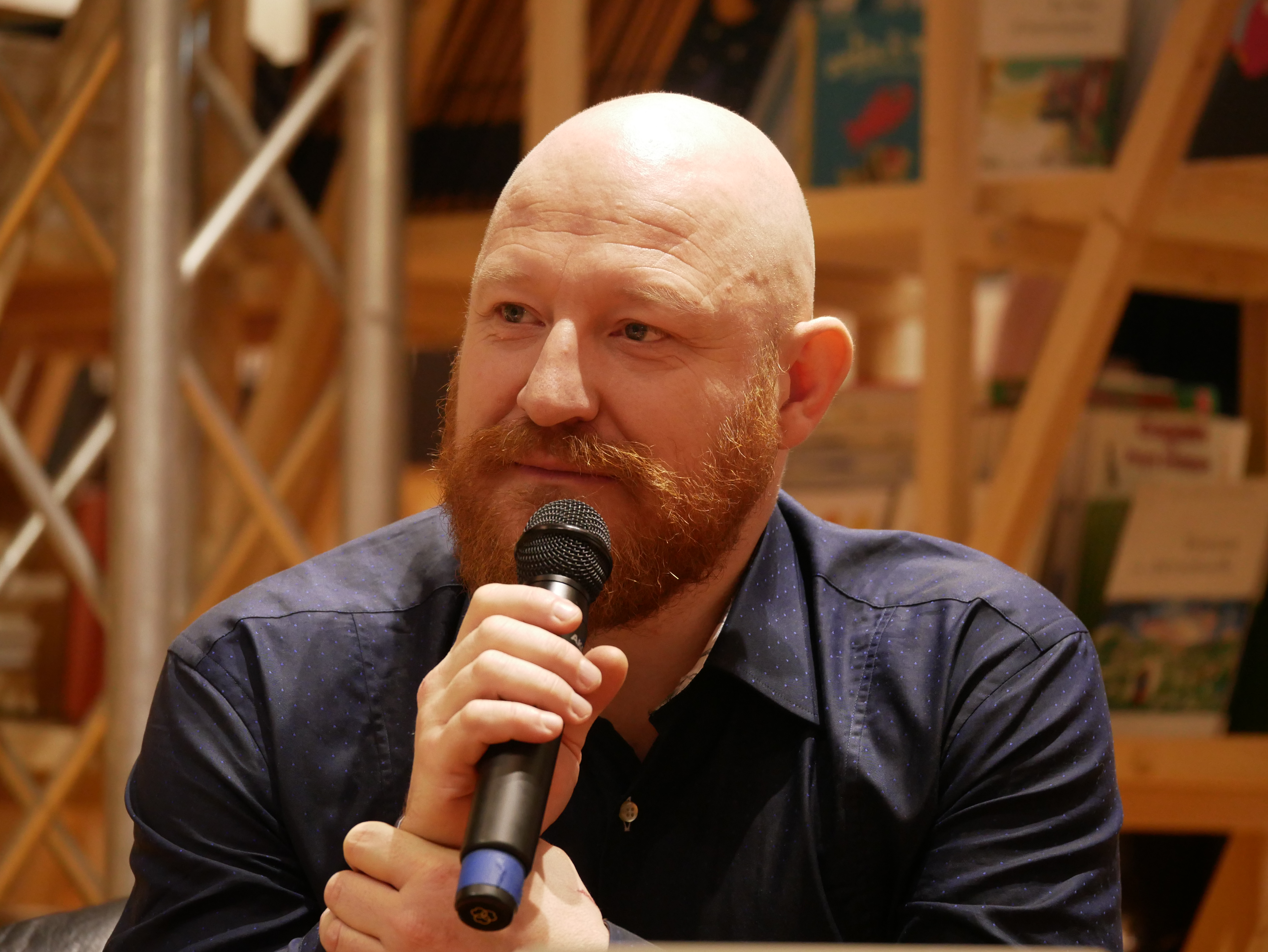 Frankfurter Buchmesse 2017 - der französische Comiczeichner Yoann.